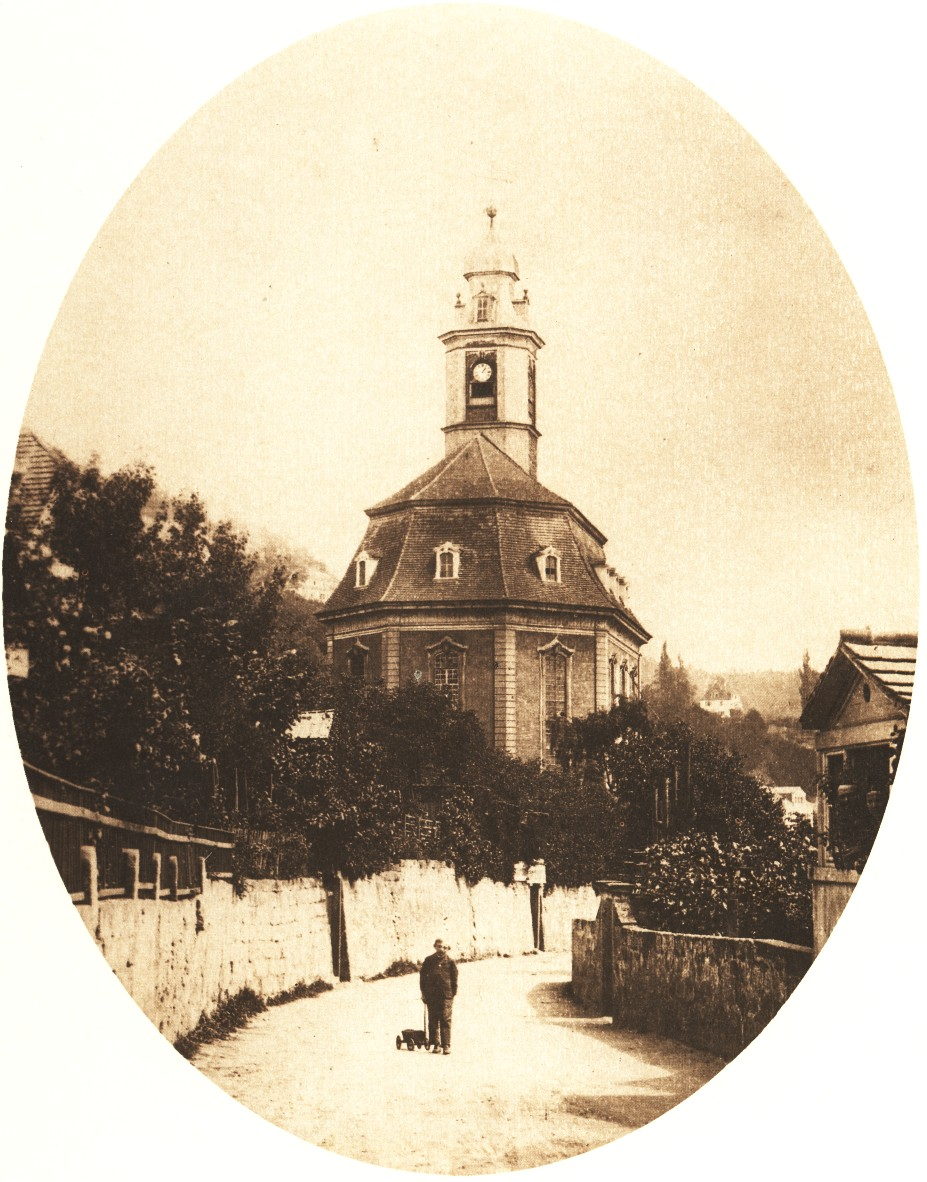 Älteste exakt datierte fotografische Aufnahme der Loschwitzer Kirche.